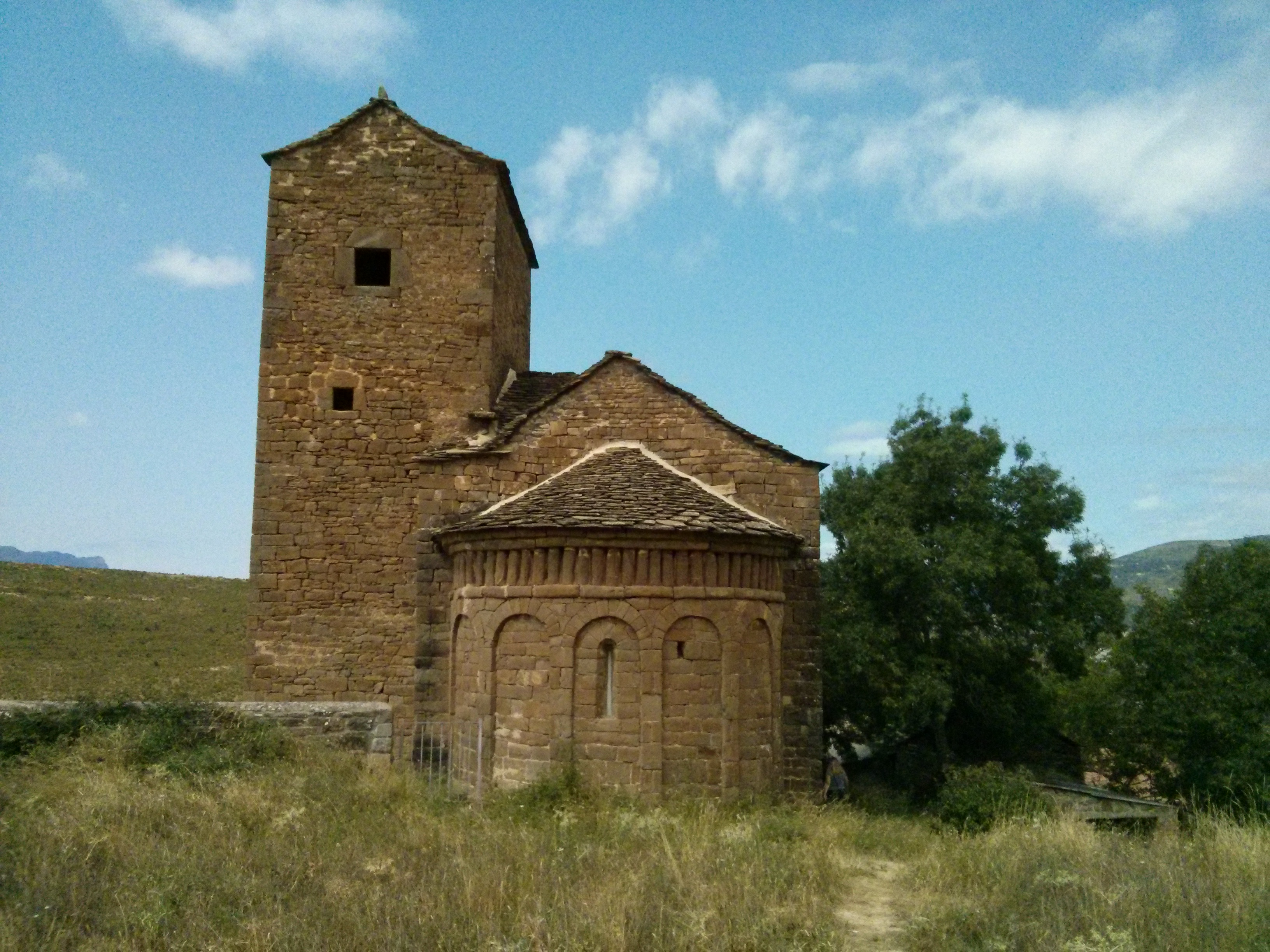 Iglesia Mozárabe de San Andrés de Satué